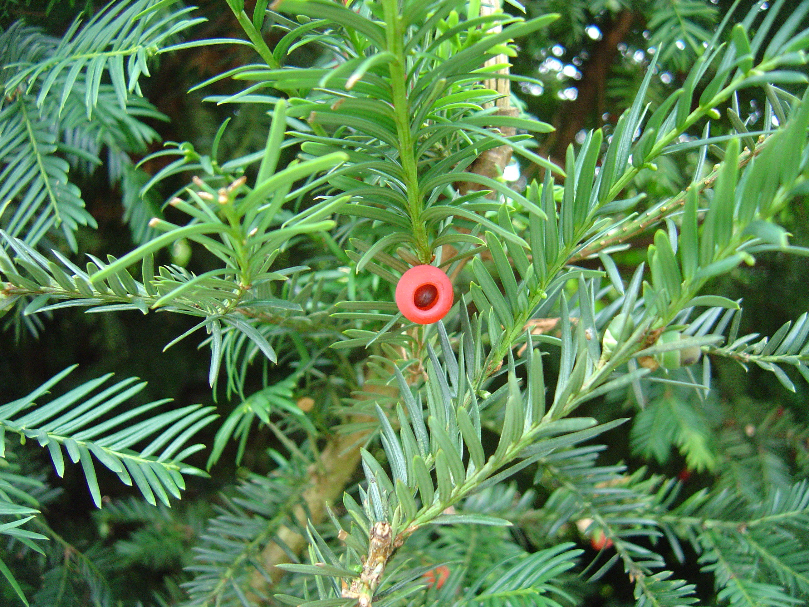 Taxus baccata "fruit"